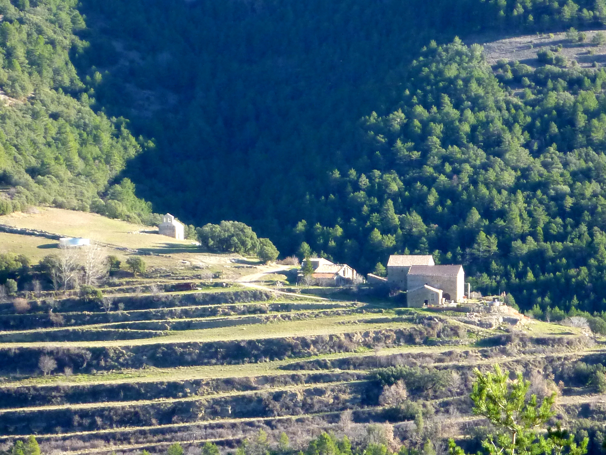 Masies del Soler i església de Sant Miquel(Odèn), envoltats de bancals de conreus